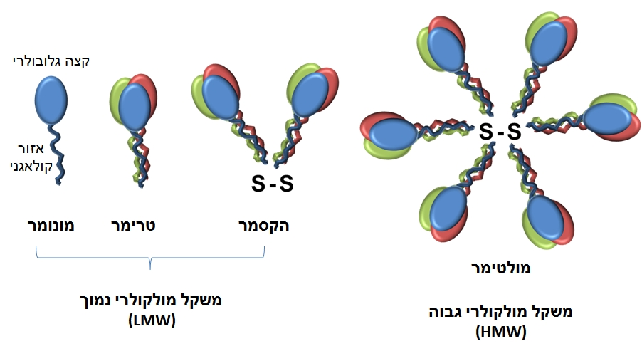 מבנה אדיפונקטין